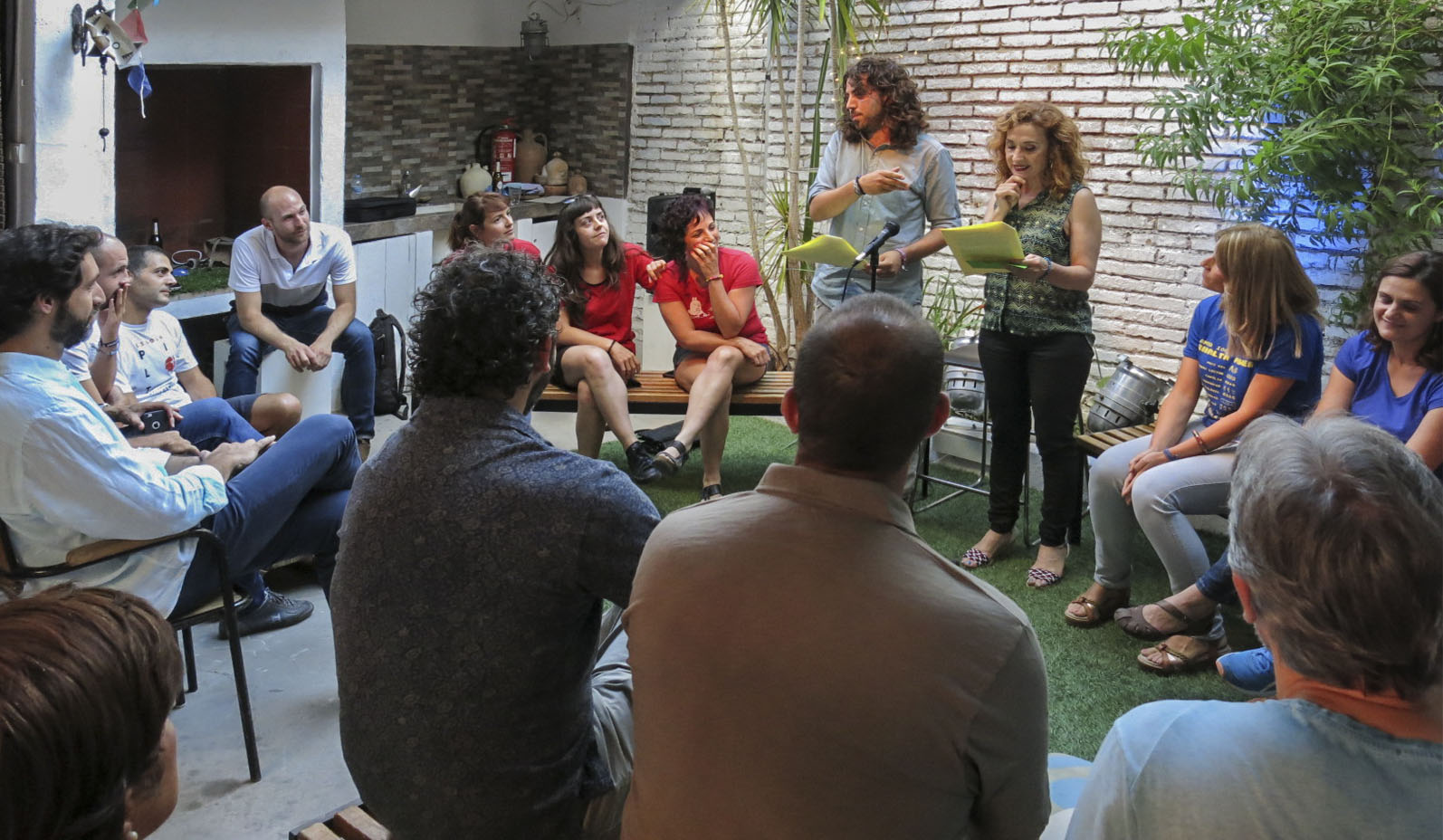 Projecte de col·laboració de l'Arxiu Ismael Latorre Mendoza amb Wikimedia Commons i Amical Wikimedia. Acte de presentació del diari digital PilotaViu, divendres 15 de juny a partir de les 19:30 de la vesprada, a la Casa Cantonera d'Algemesí. PilotaViu va començar una nova etapa el passat 1 de gener de 2018, amb el canvi de nom. Varen participar Waldo i Àlvaro, dos autèntics mites de la pilota i les jugadores del CPV Algemesí. La tertúlia va ser conduïda per Pau Molins i Pepa Gómez.